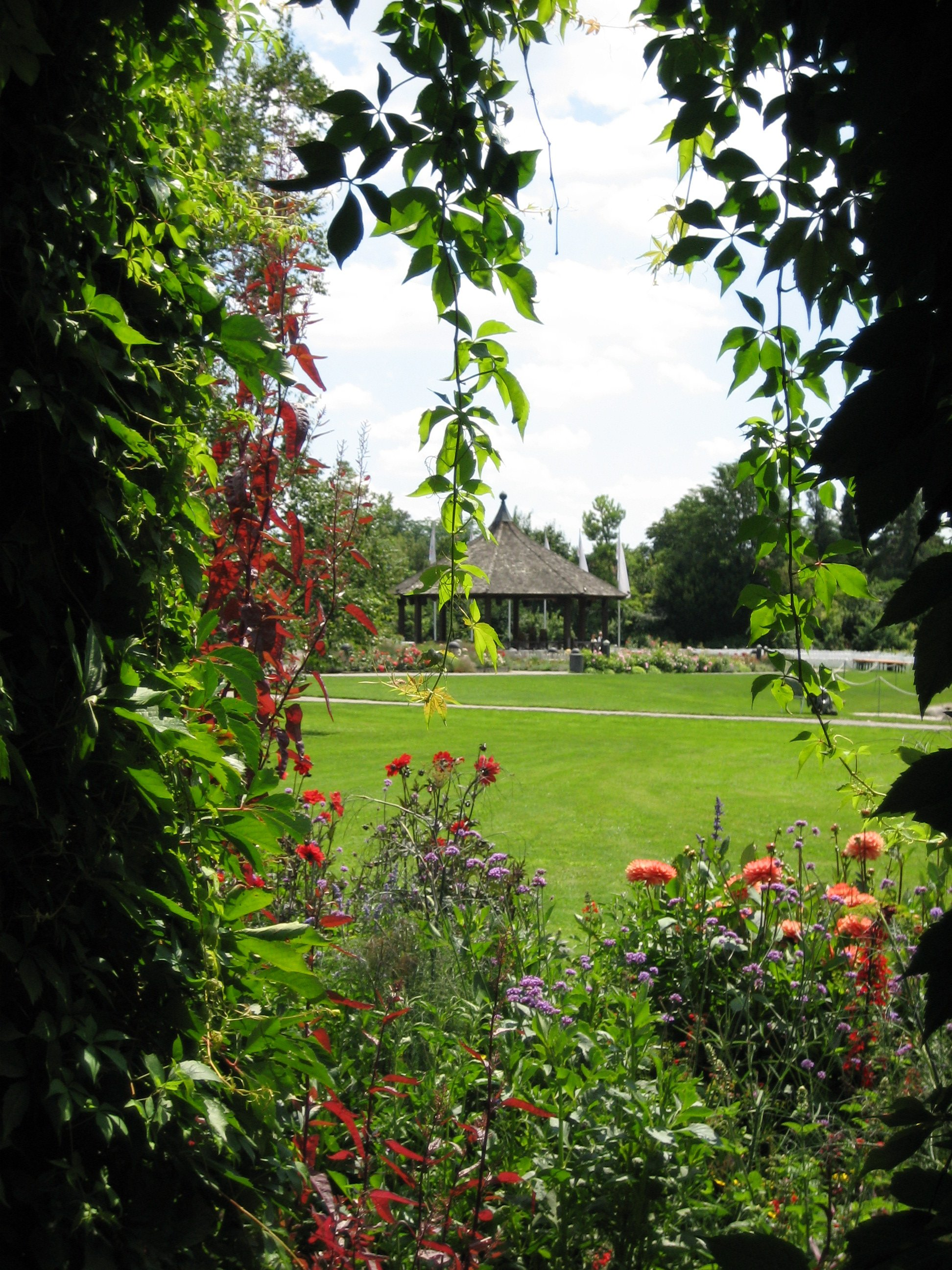 Botanischer Garten in Augsburg, Blick aus dem Pavillon der Kletterpflanzen